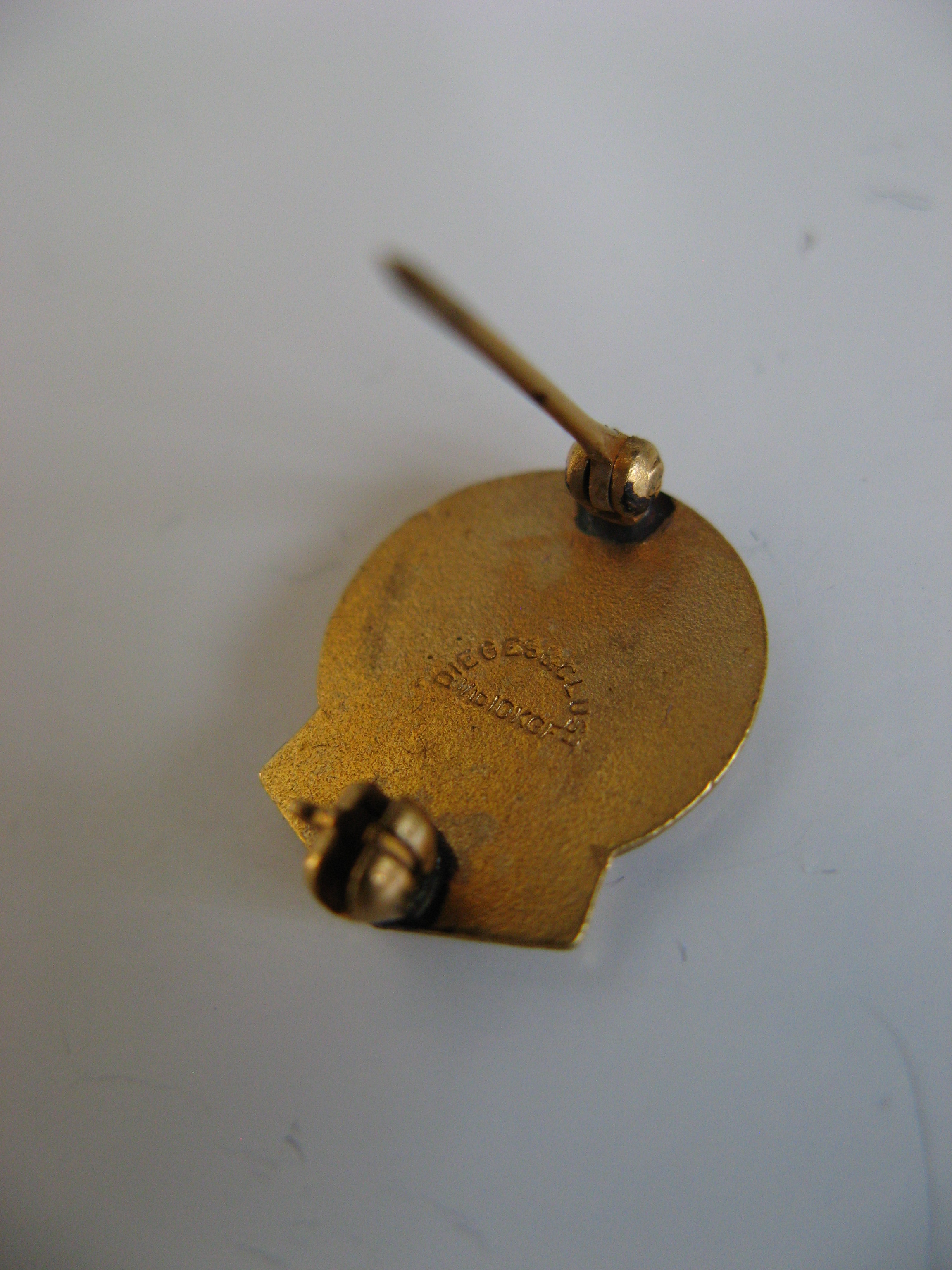 Dispositif d'une épingle de sûreté sur une épinglette gold-filled